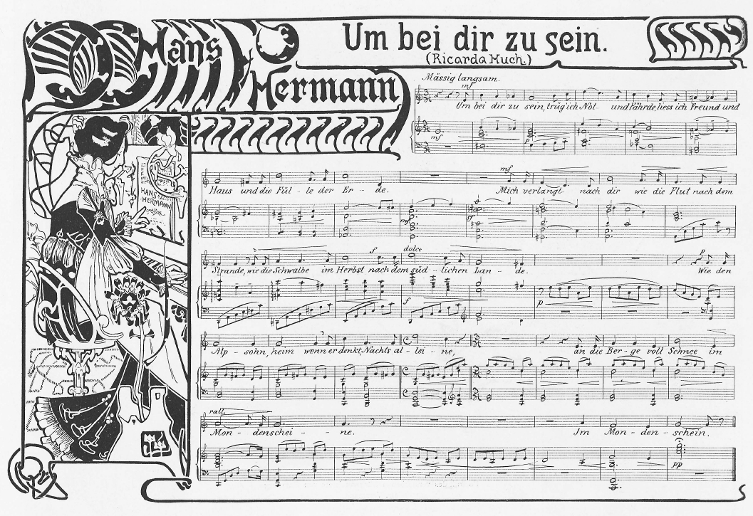 Notenblatt des Komponisten Hans Hermann